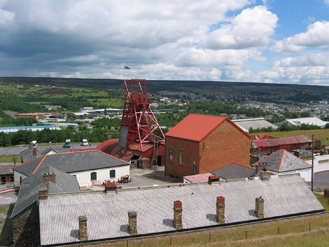 Big Pit Mining Museum near Blaenafon, Wales